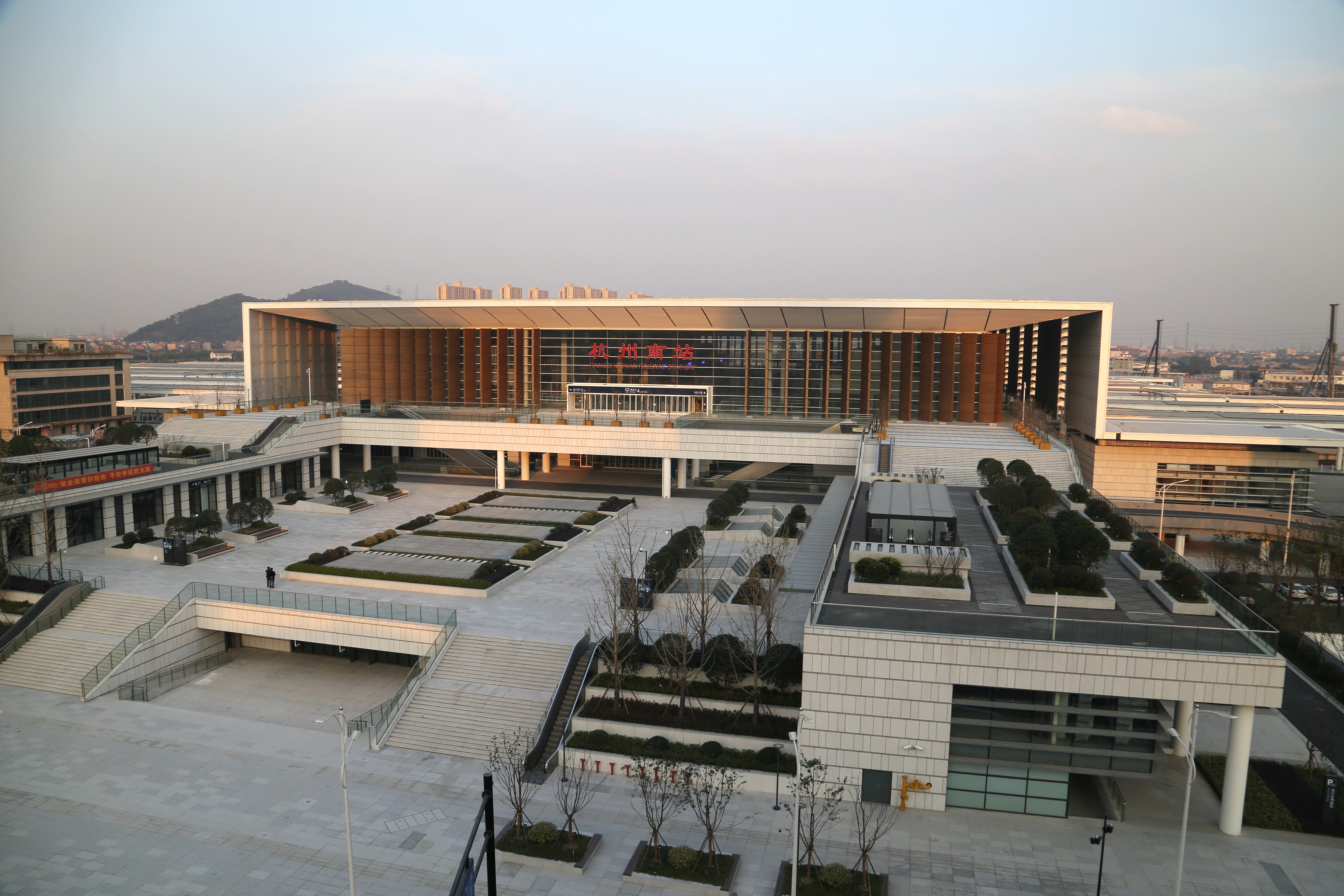 从西广场上空观看杭州南站